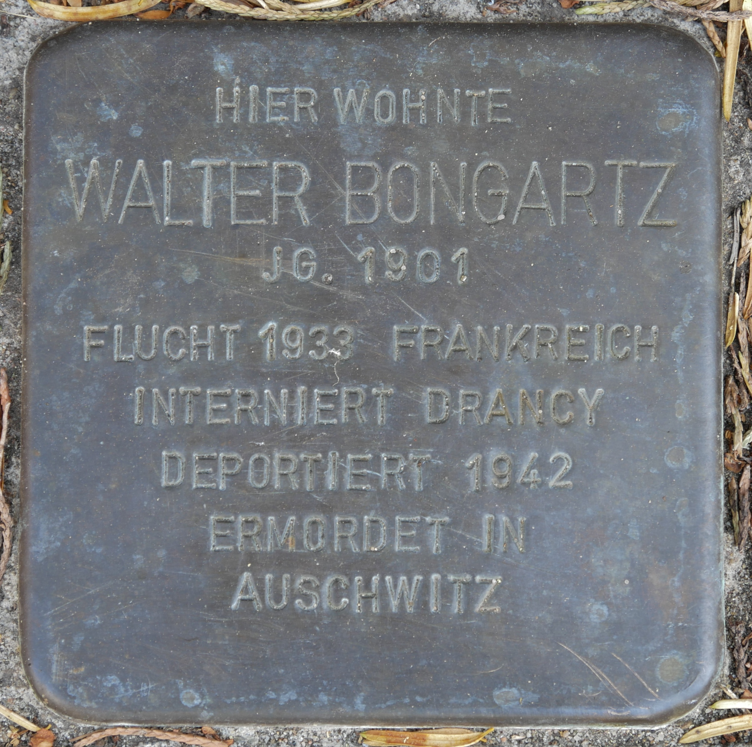 Stolpersteine Wesel: Bongartz, Walter